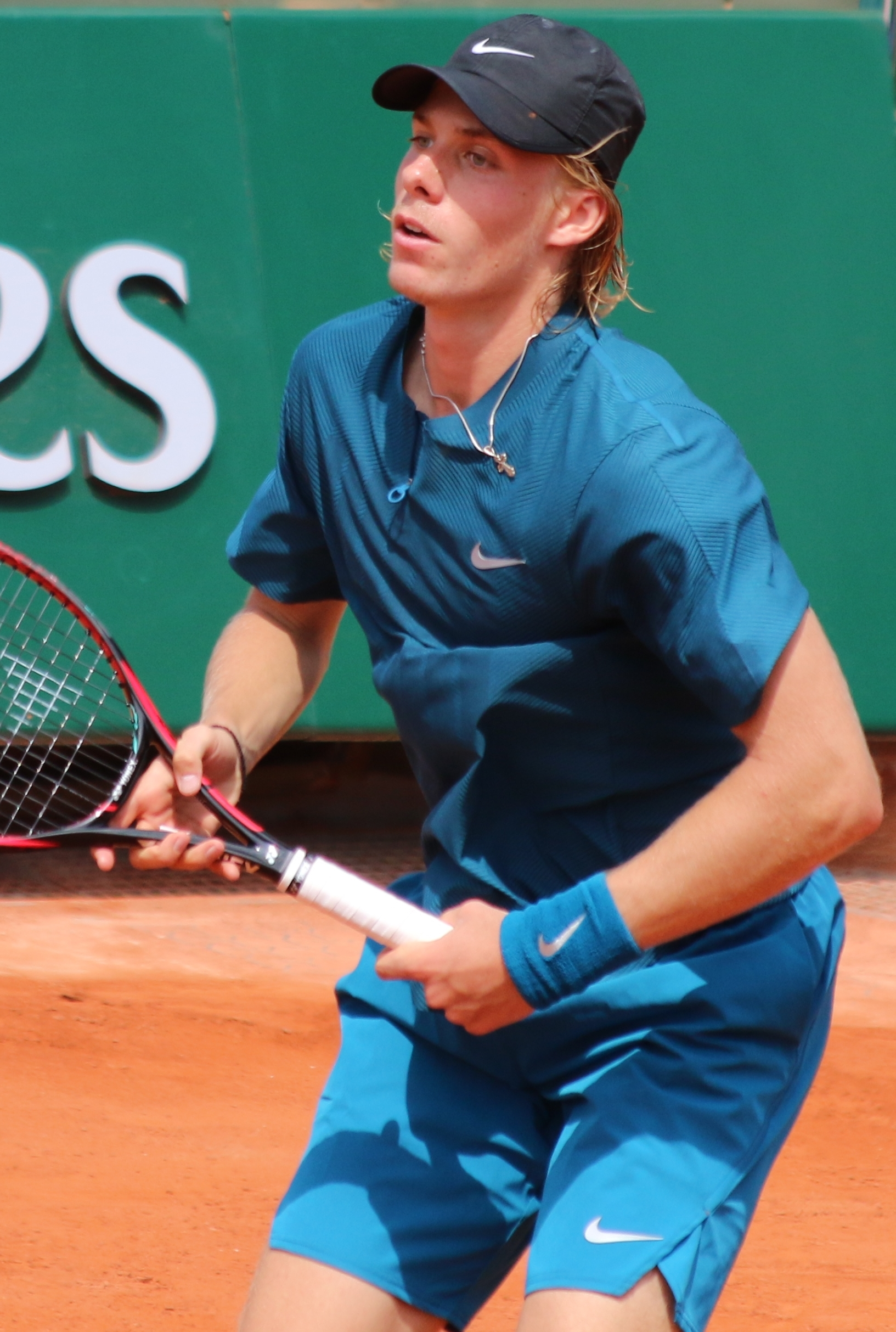 Shapovalov RG18 (12)